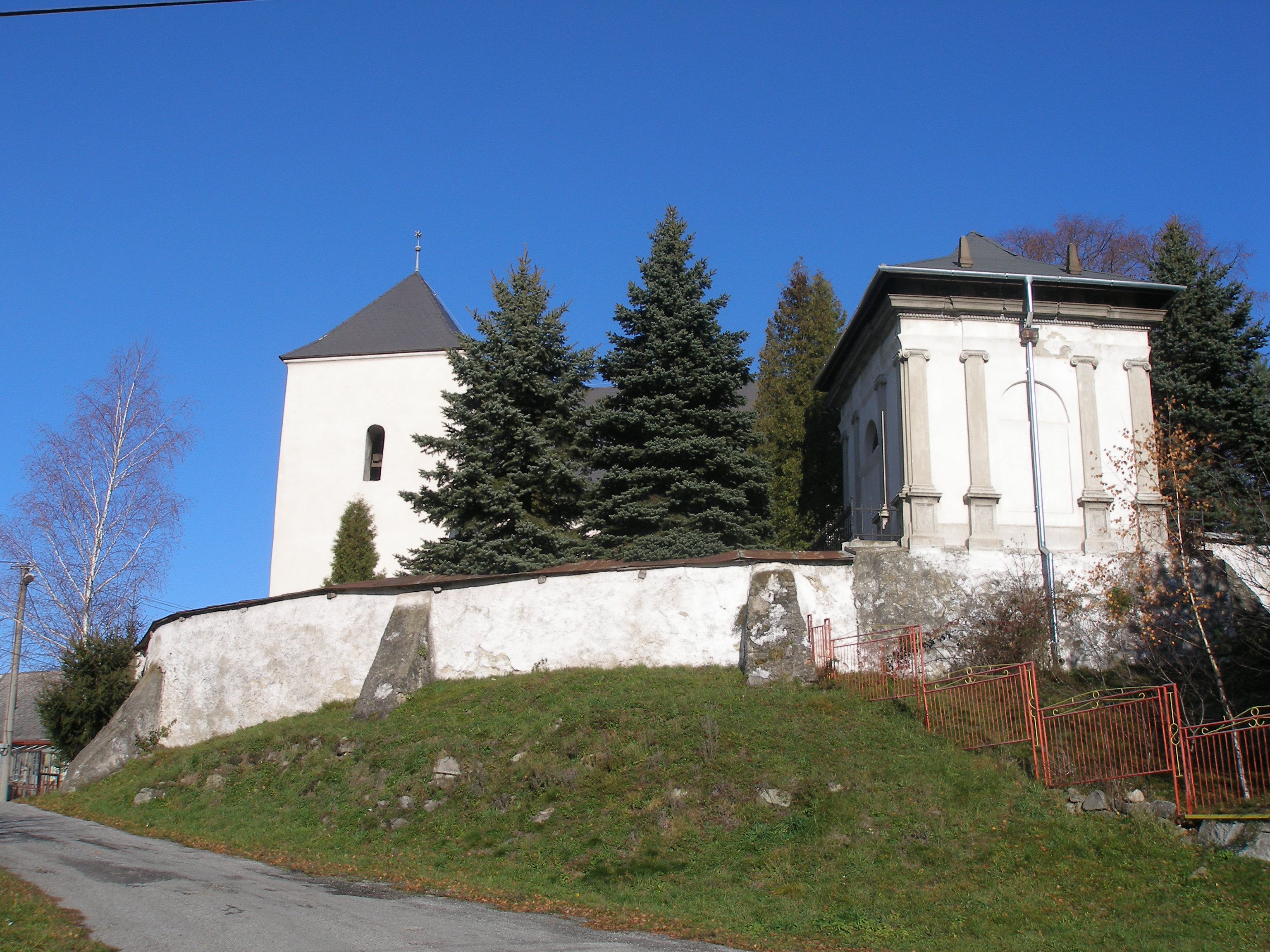 Obec Žehňa v okrese Prešov